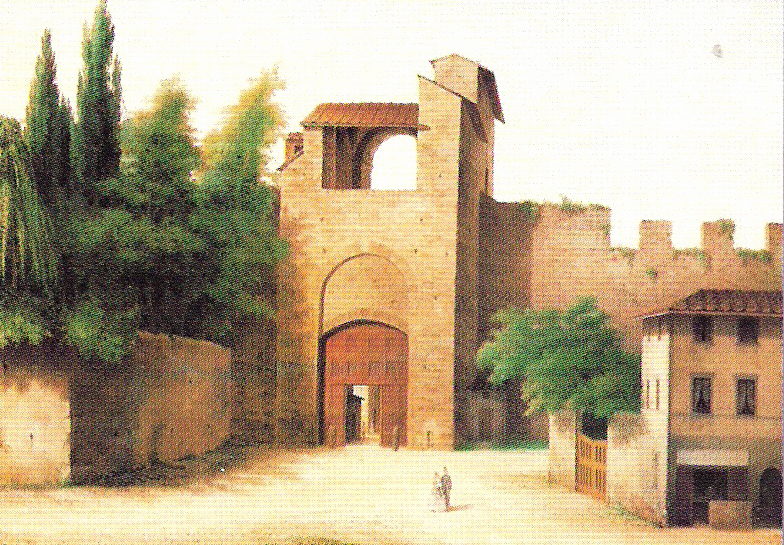 Porta a Pinti (esterno)